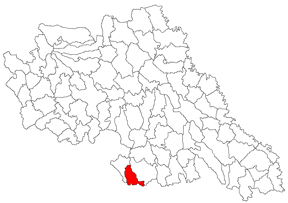 Categorie:Hărţi ale judeţului Iaşi